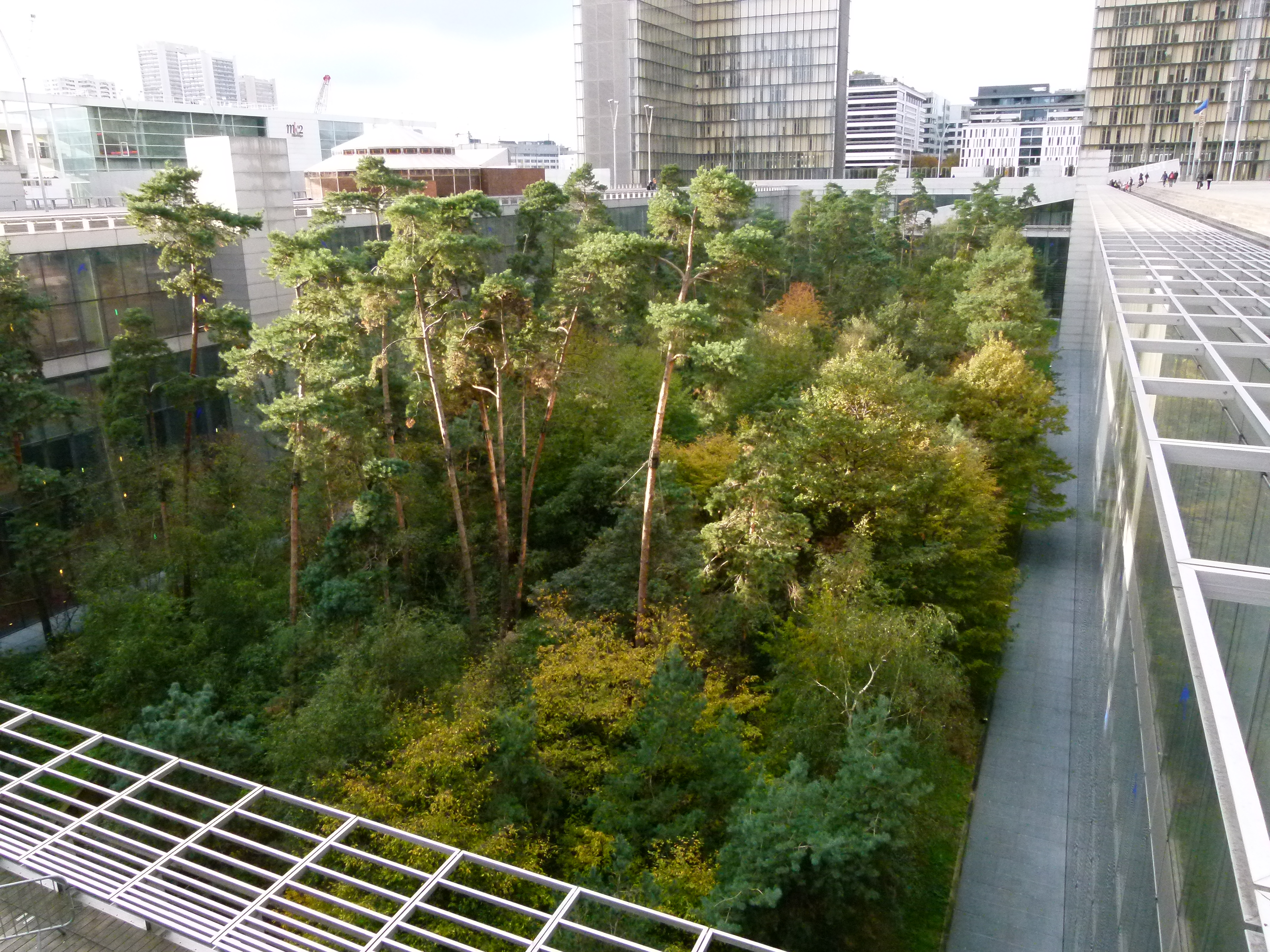 La forêt au milieu des livres - Paris